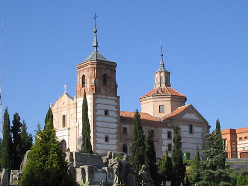 Churcj in Cerro de los Ángeles